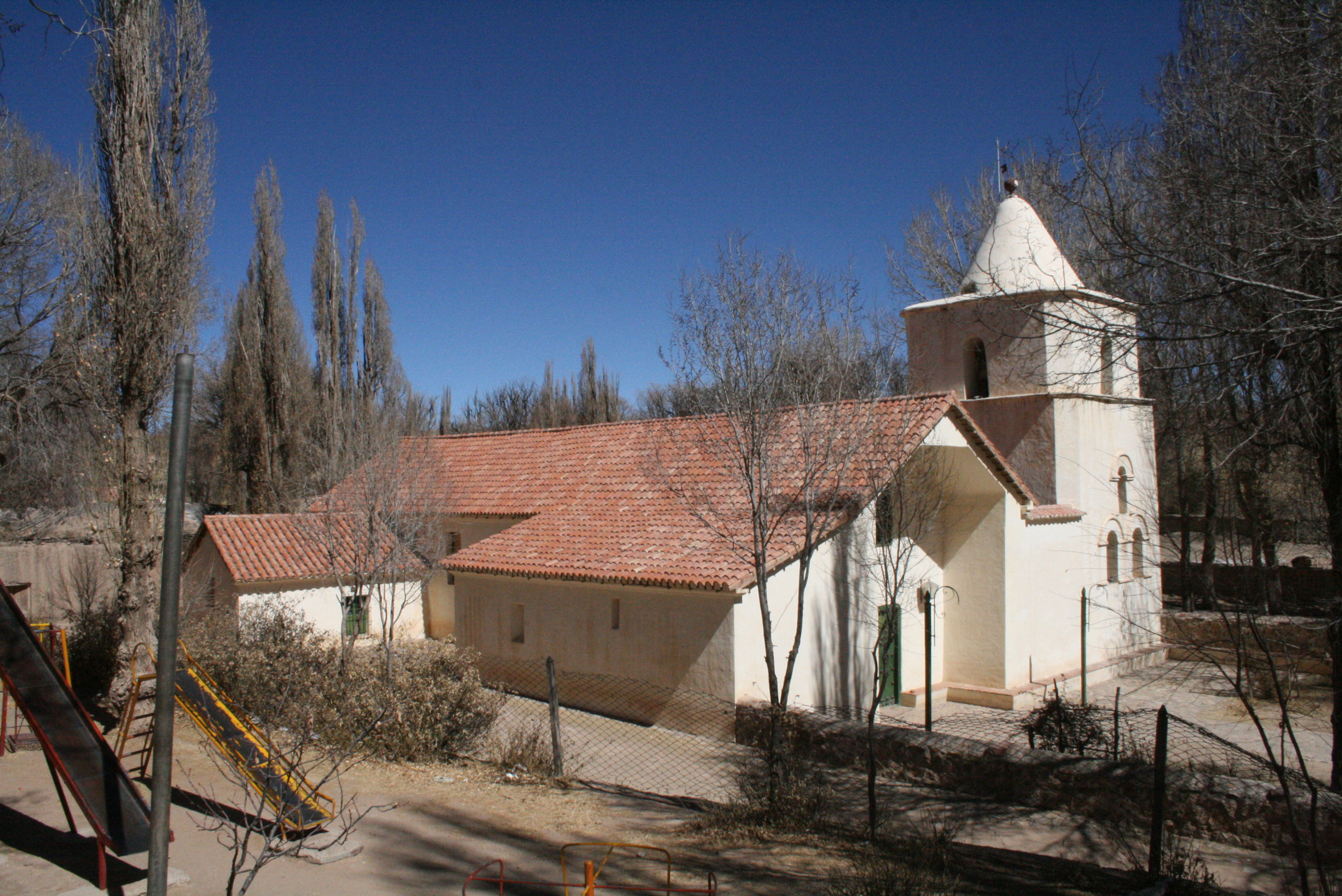 Capilla de Yavi